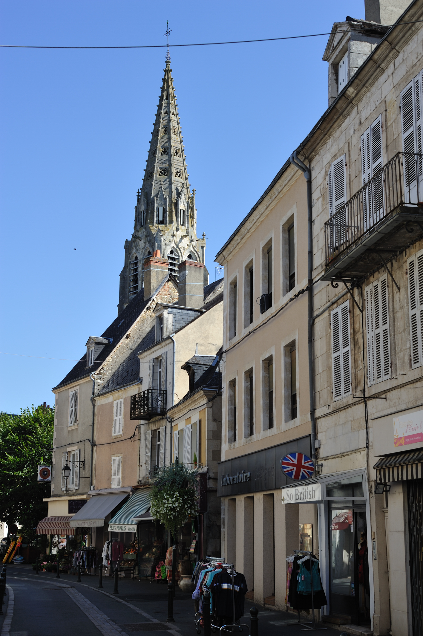 Rue Grande, Argenton-sur-Creuse, Indre, France